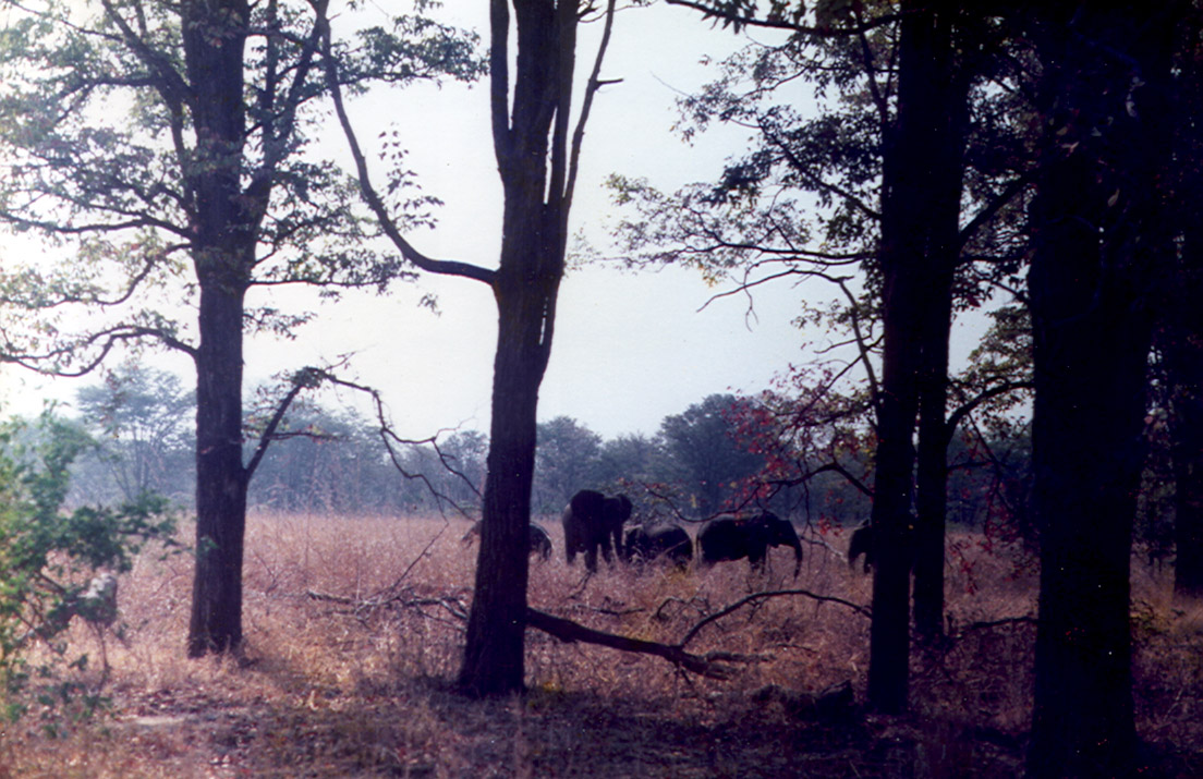 Liwonde-Nationalpark am Shire-Fluss - Malawi - Afrika